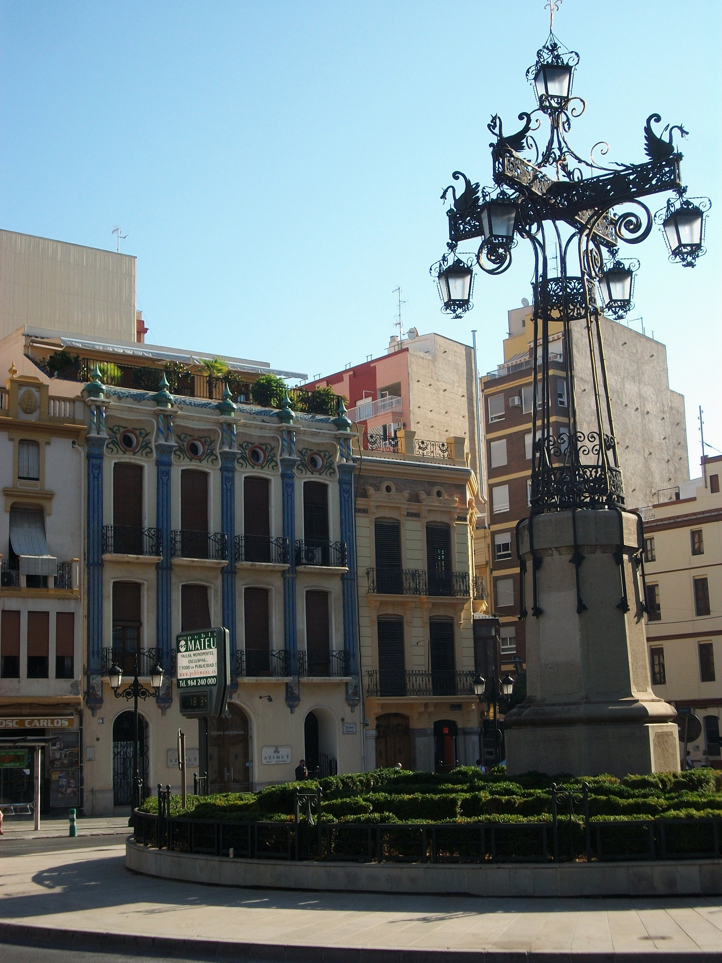 Casa de les Cigonyes i la Farola, Castelló de la Plana.